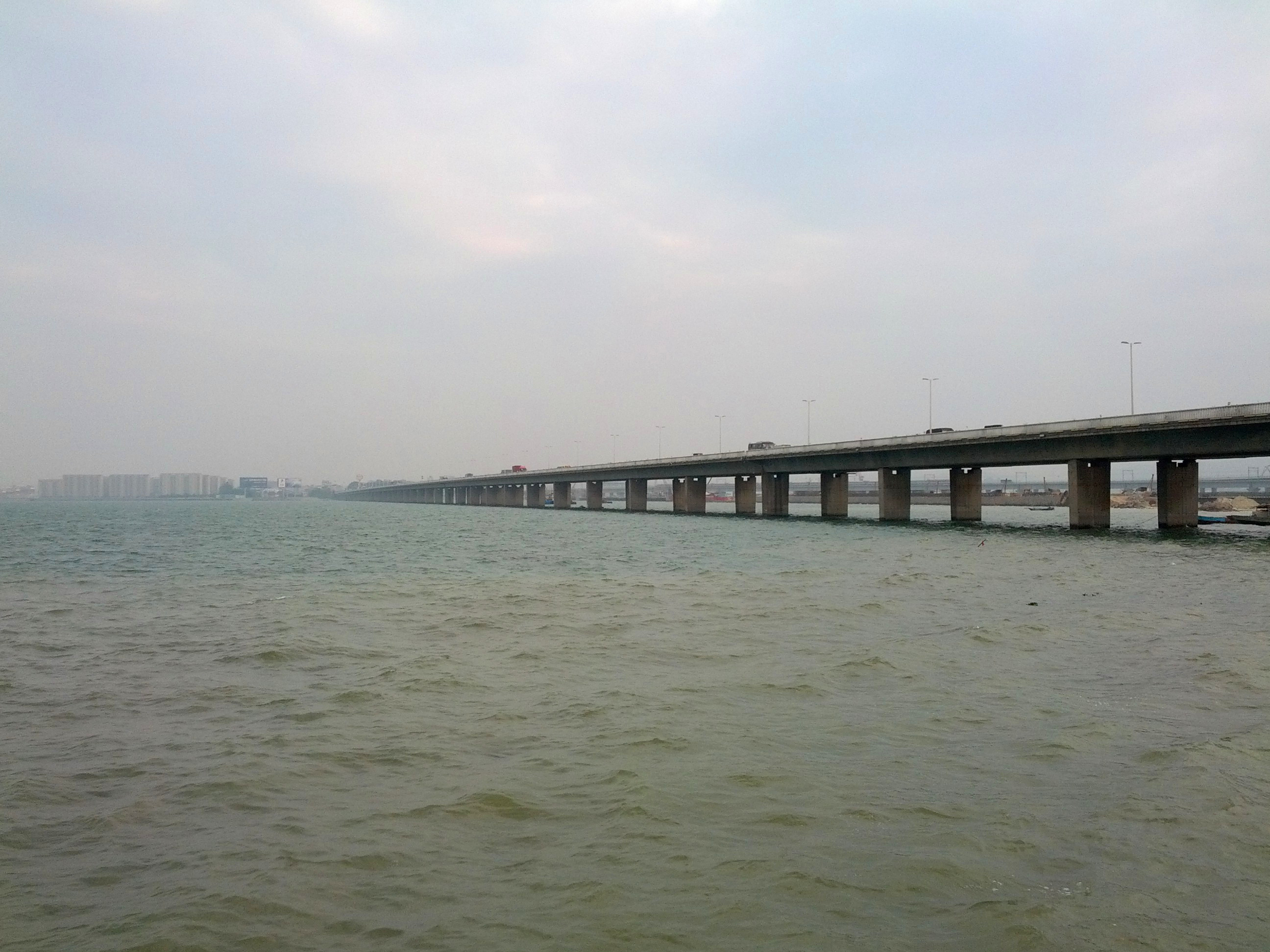 往厦门方向望去的厦门大桥